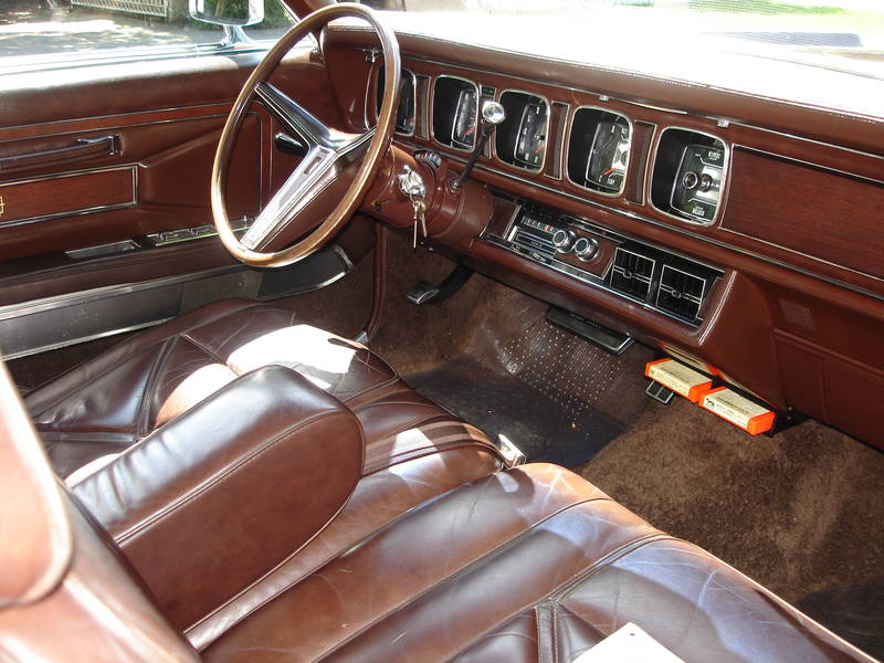 1971 Lincoln Continental Mark III